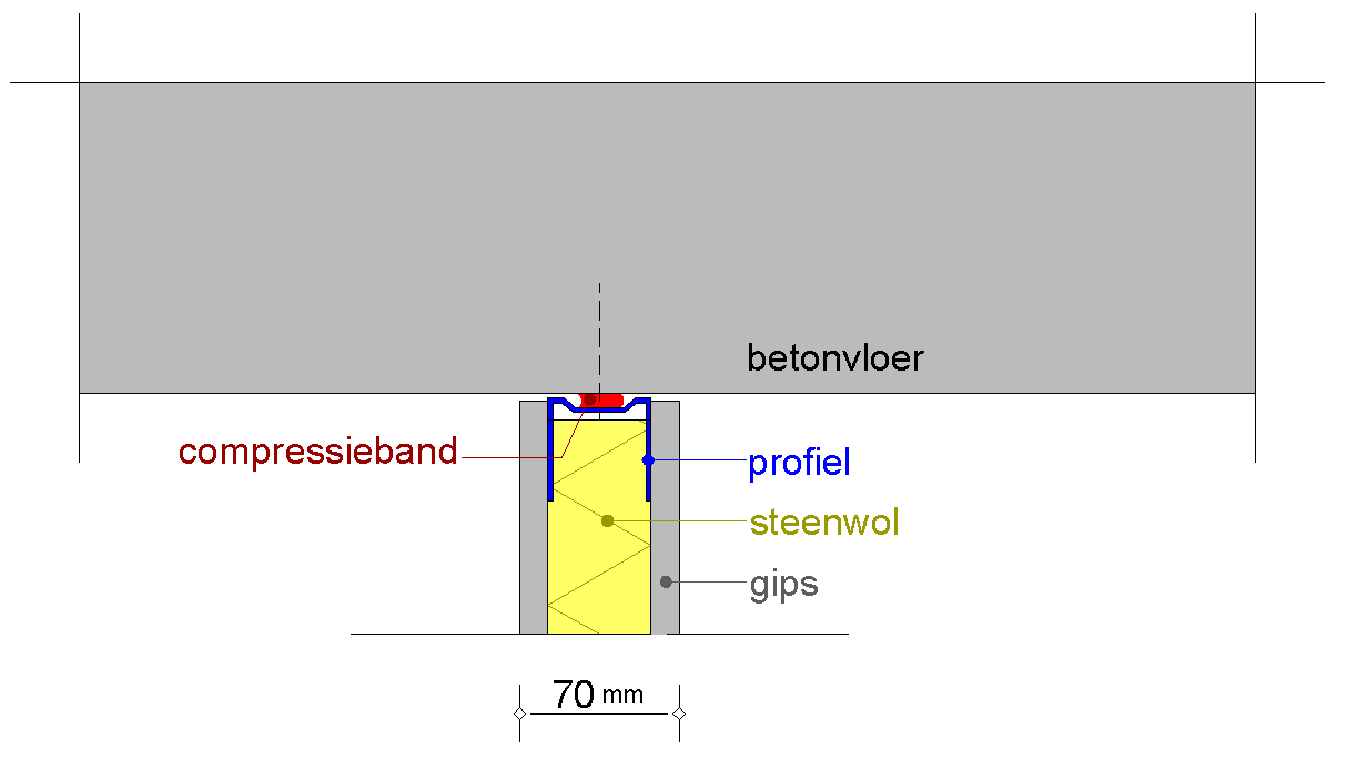 metalstudwand